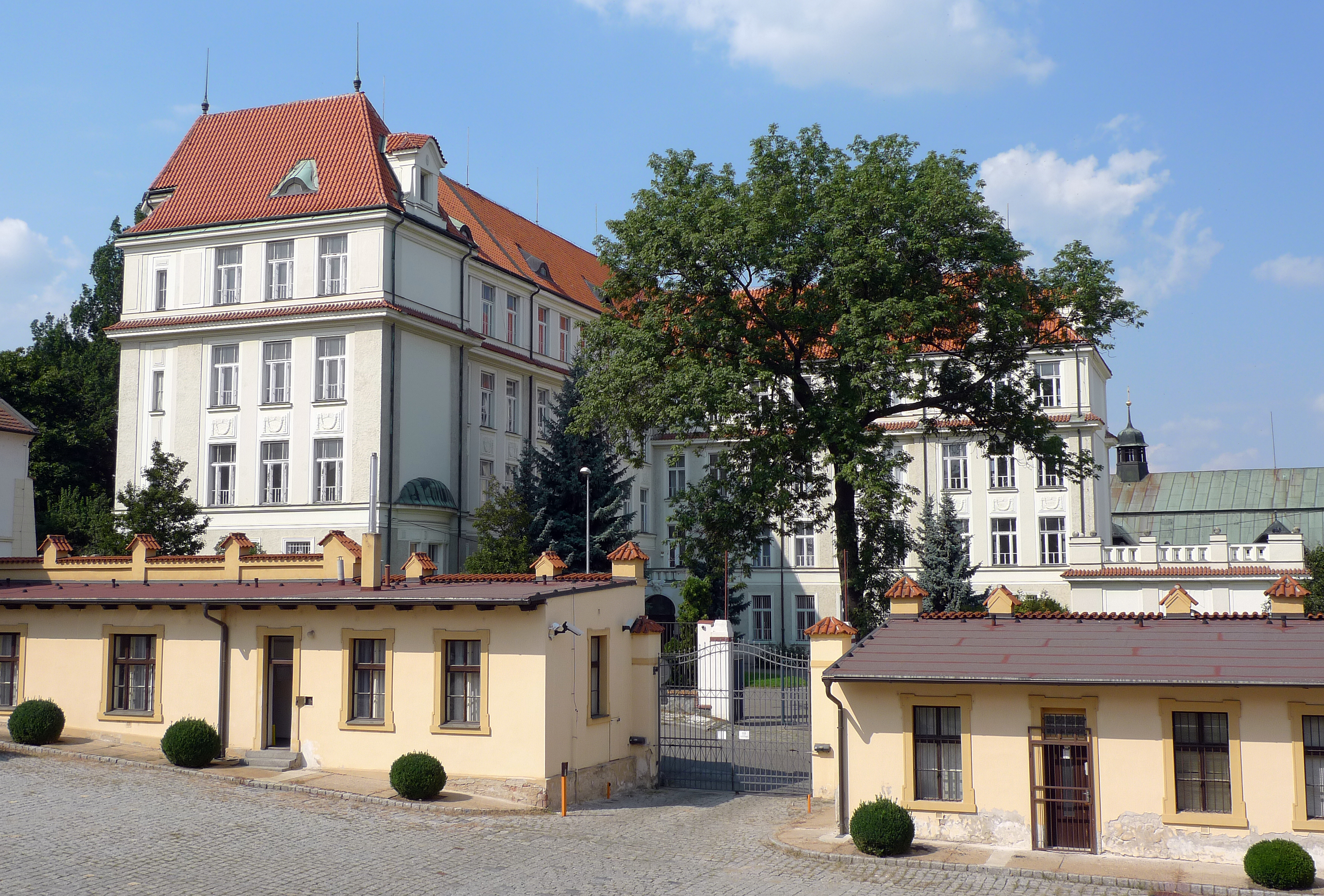 Gymnázium U Libeňského zámku.